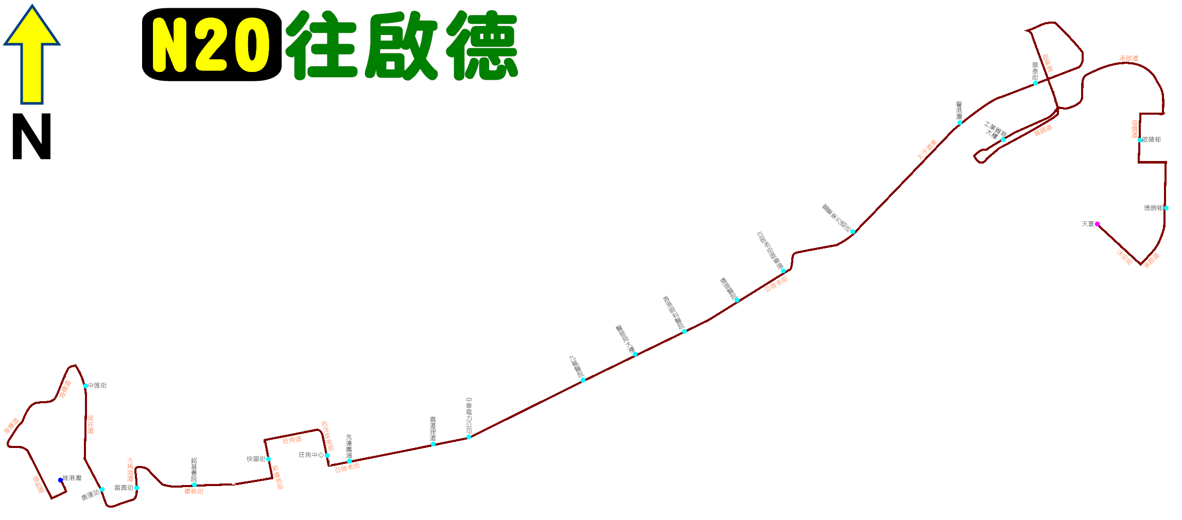 城巴N20線的走線圖